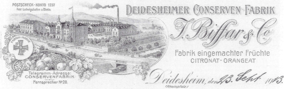 Briefkopf der Conservenfabrik J. Biffar, Deidesheim, 1913